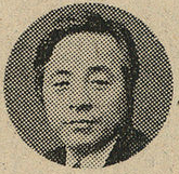 대한민국의 정치인